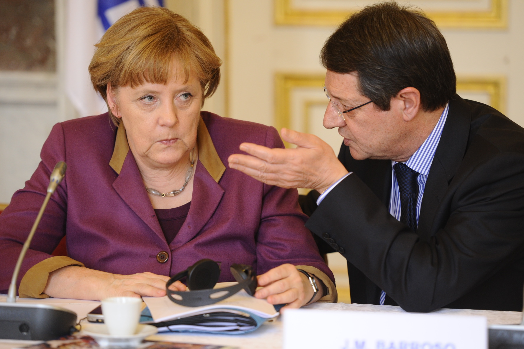 Merkel, Anastasiades